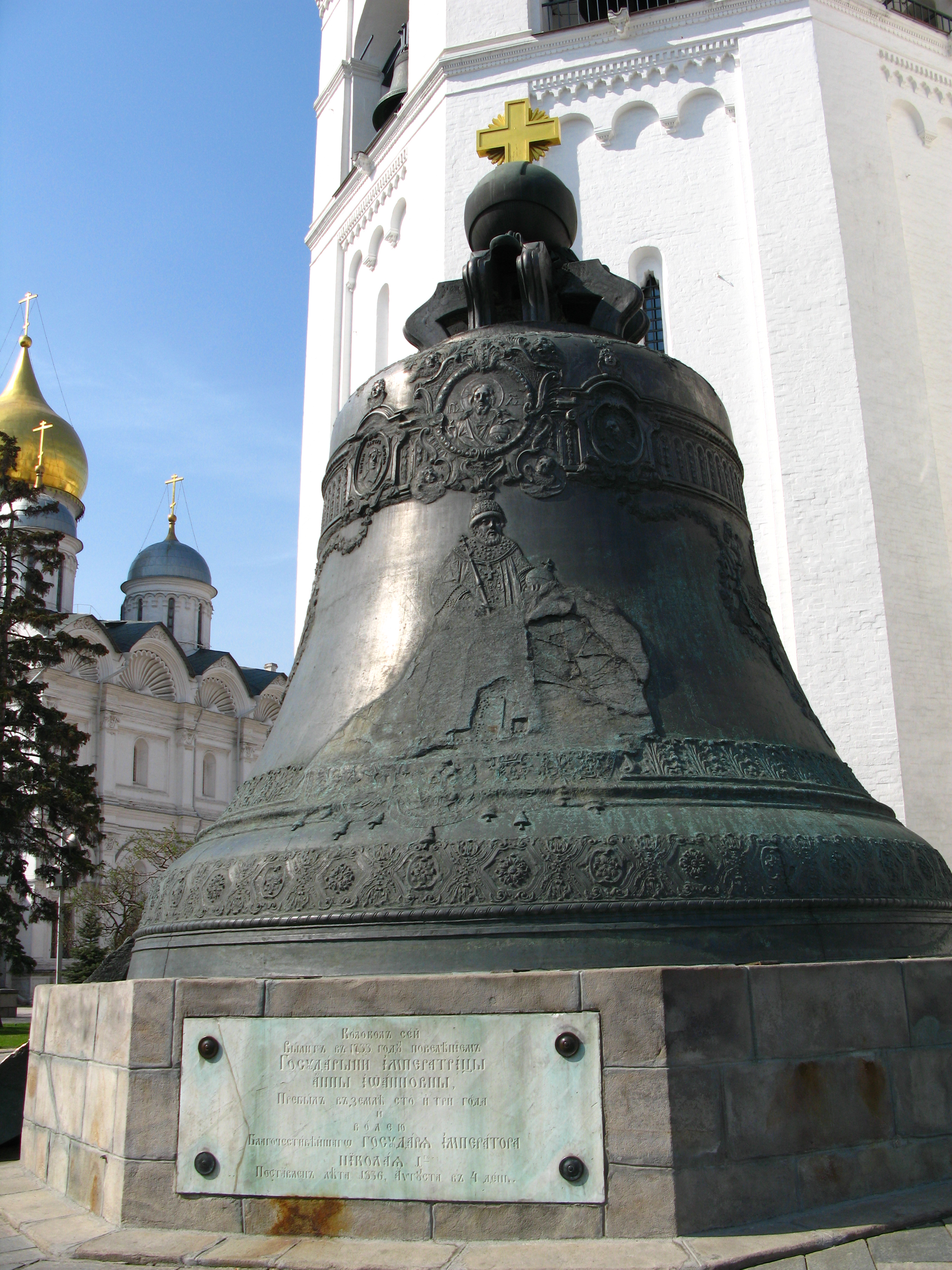 Car-zvono. Kremelj, Moskva.